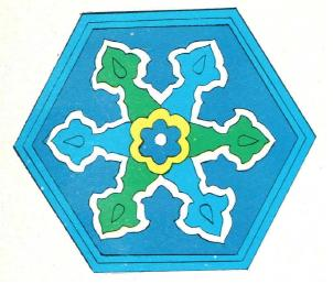 نموذج من الزخرفة التركية القاشانية